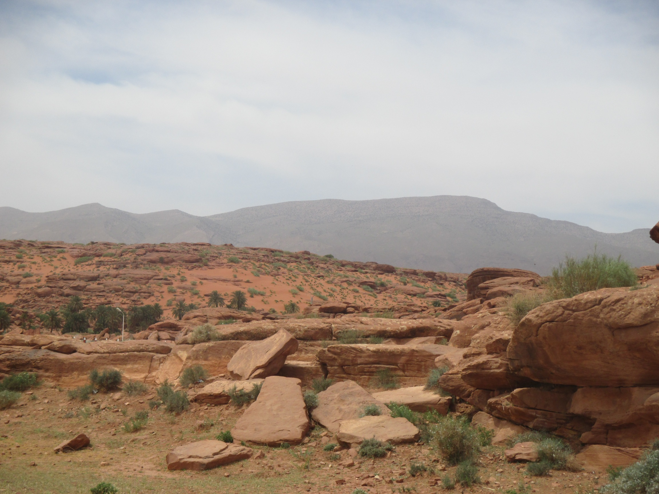 N47, Tiout, Algérie